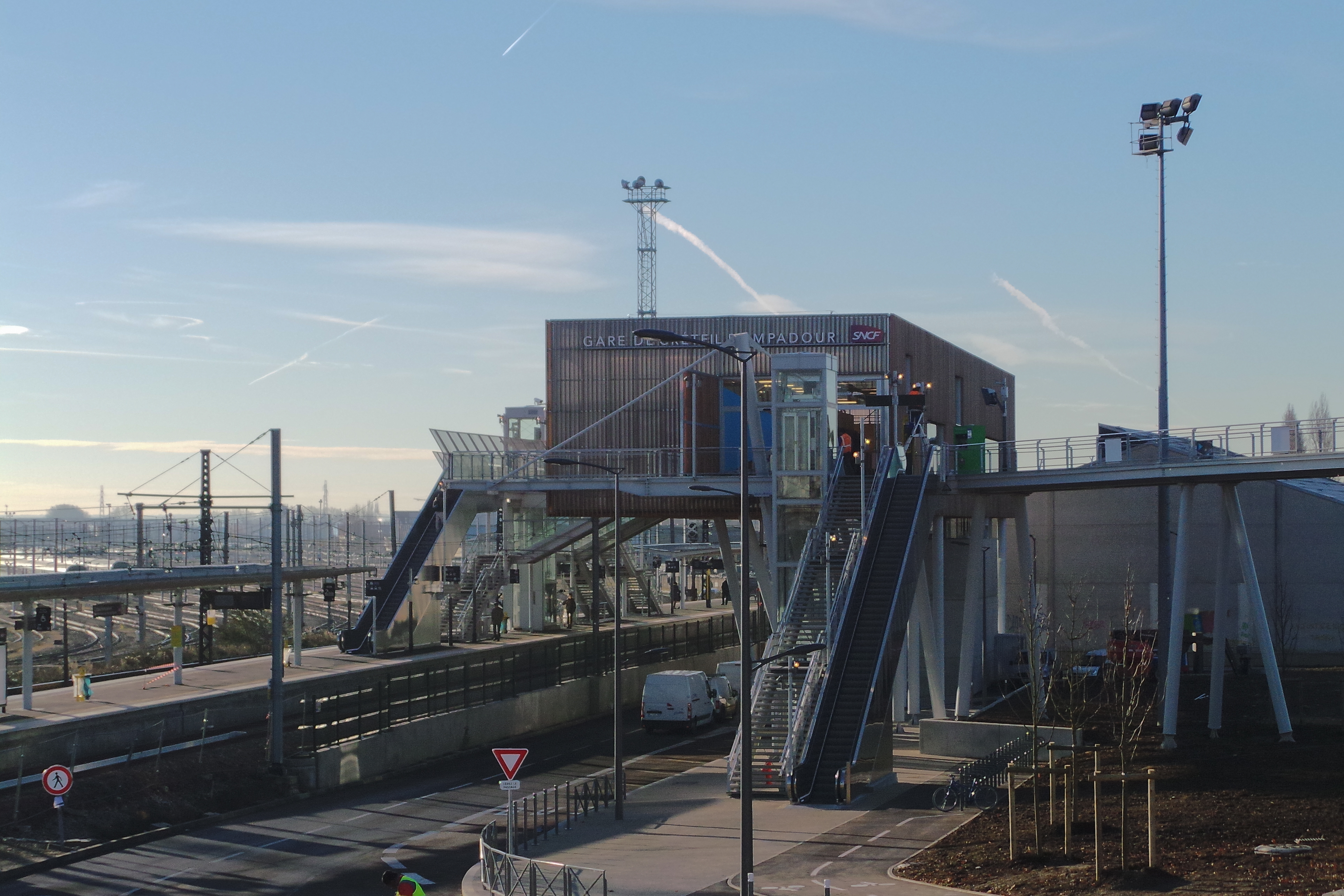 Gare de Créteil-Pompadour / RER D / Créteil, Val-de-Marme, France